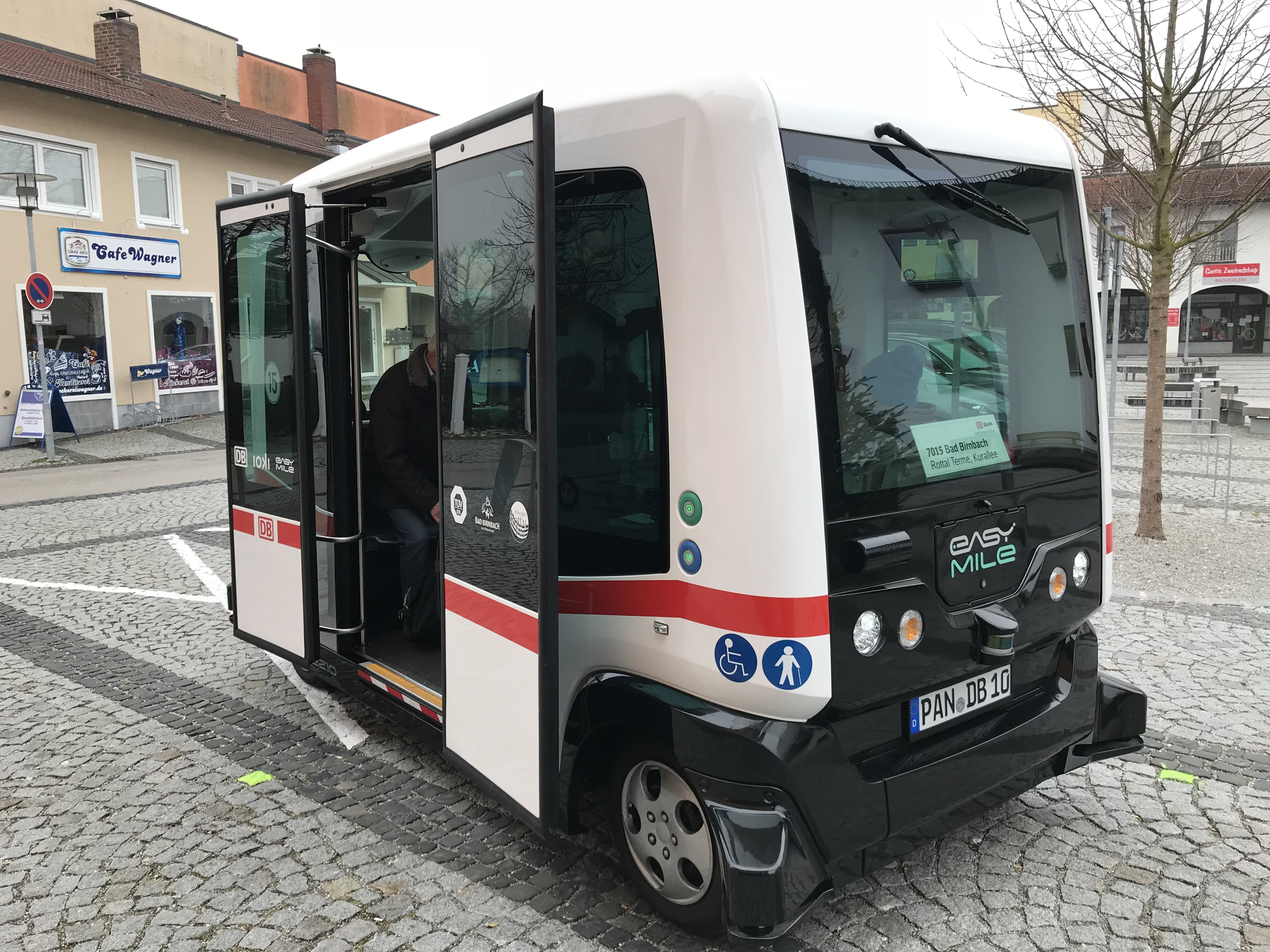 Easymile autonomous bus in Bad Birnbach